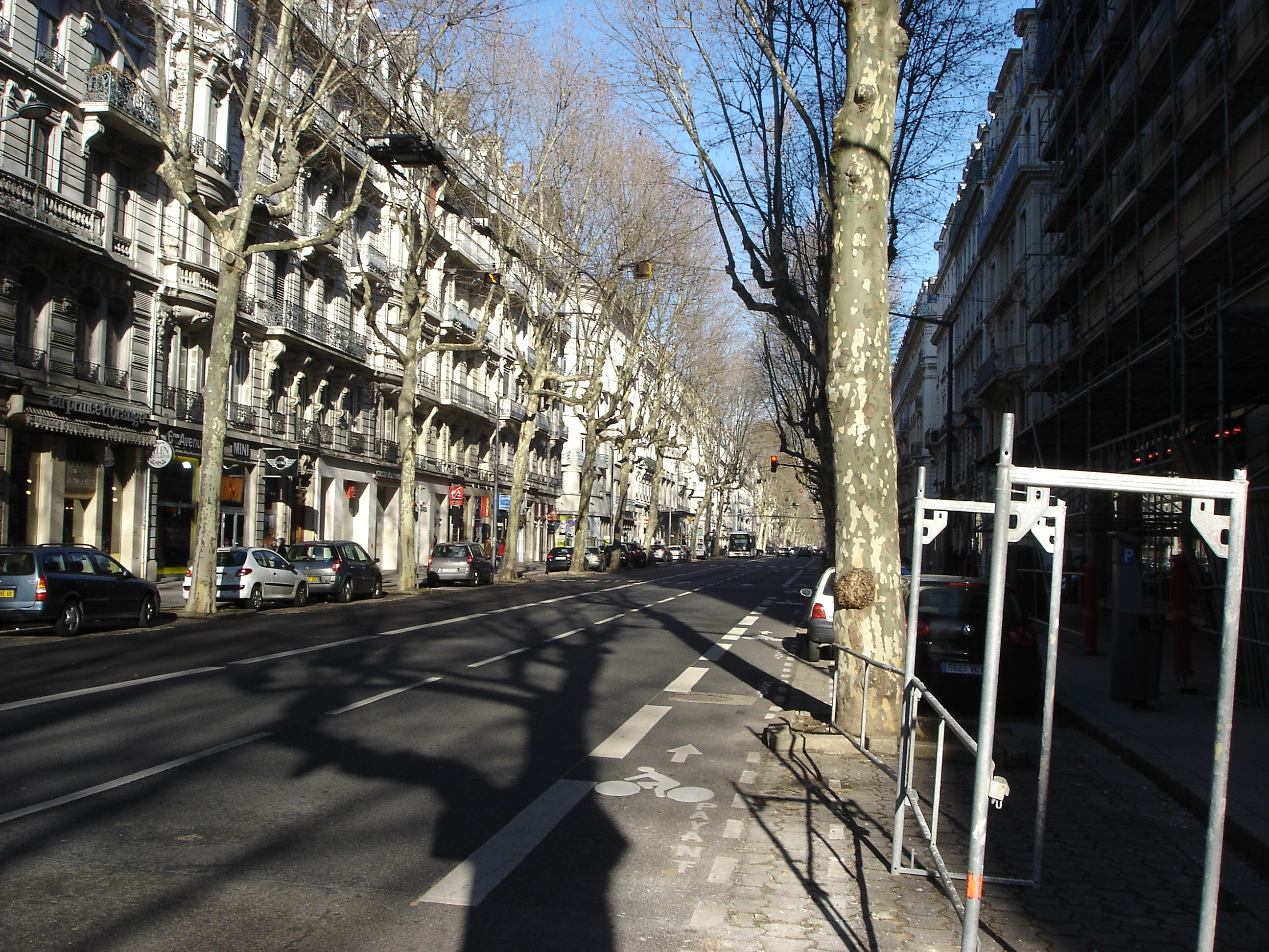 L'avenue de Saxe dans le 6ème arrondissement de Lyon.